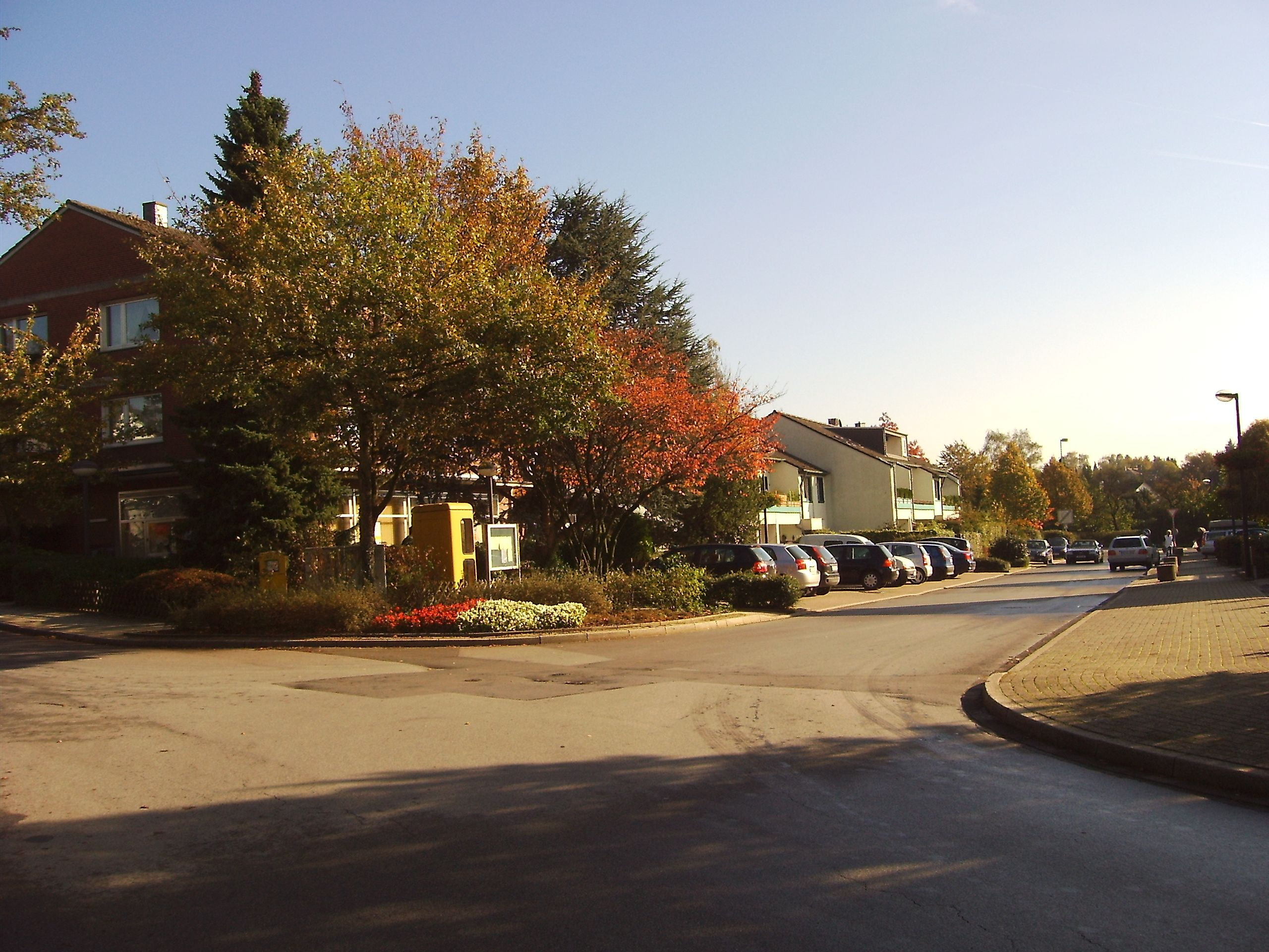 Heiligenhaus-Isenbügel, Kreis Mettmann, Deutschland